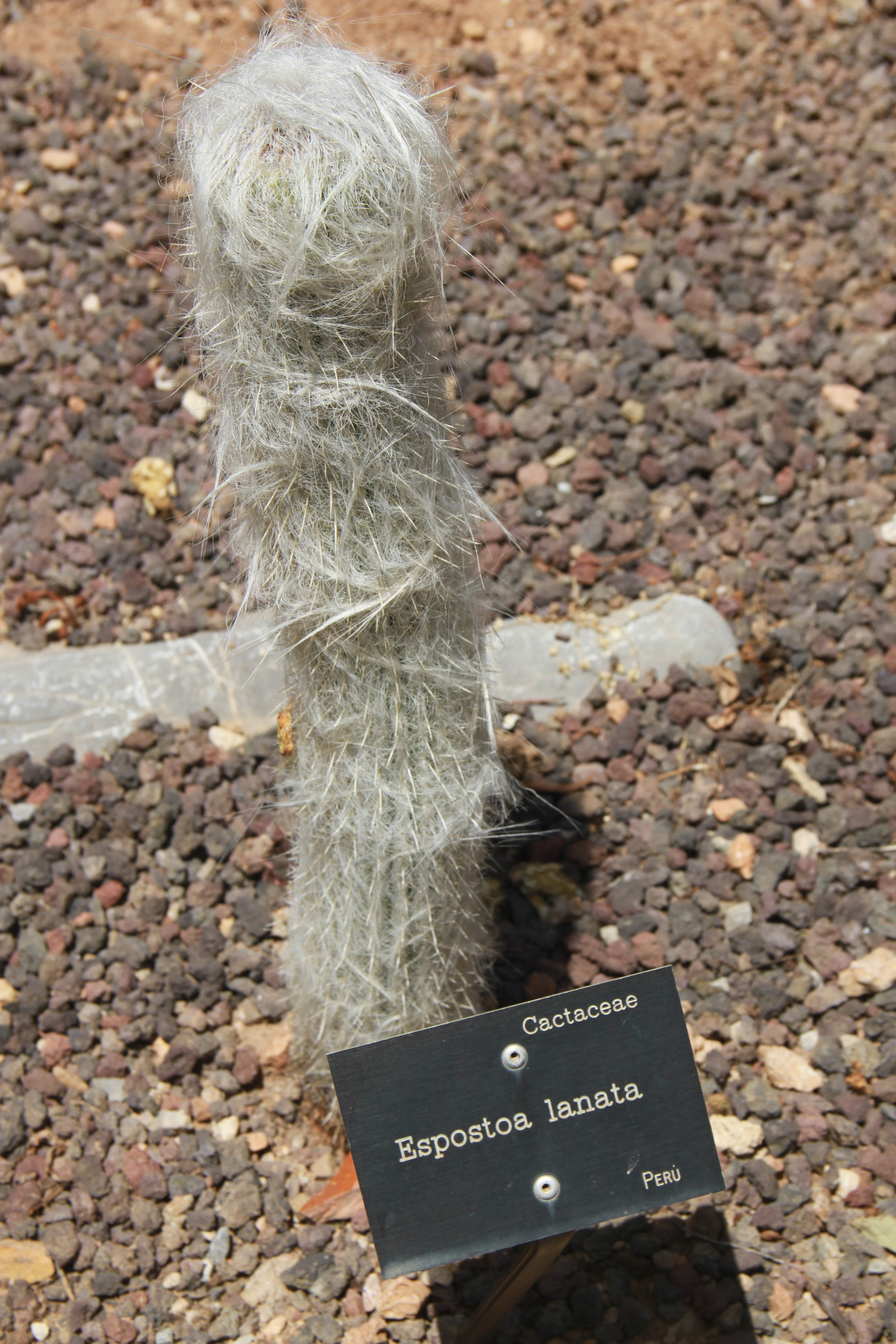 Espostoa lanata. Сольєрський ботанічний сад